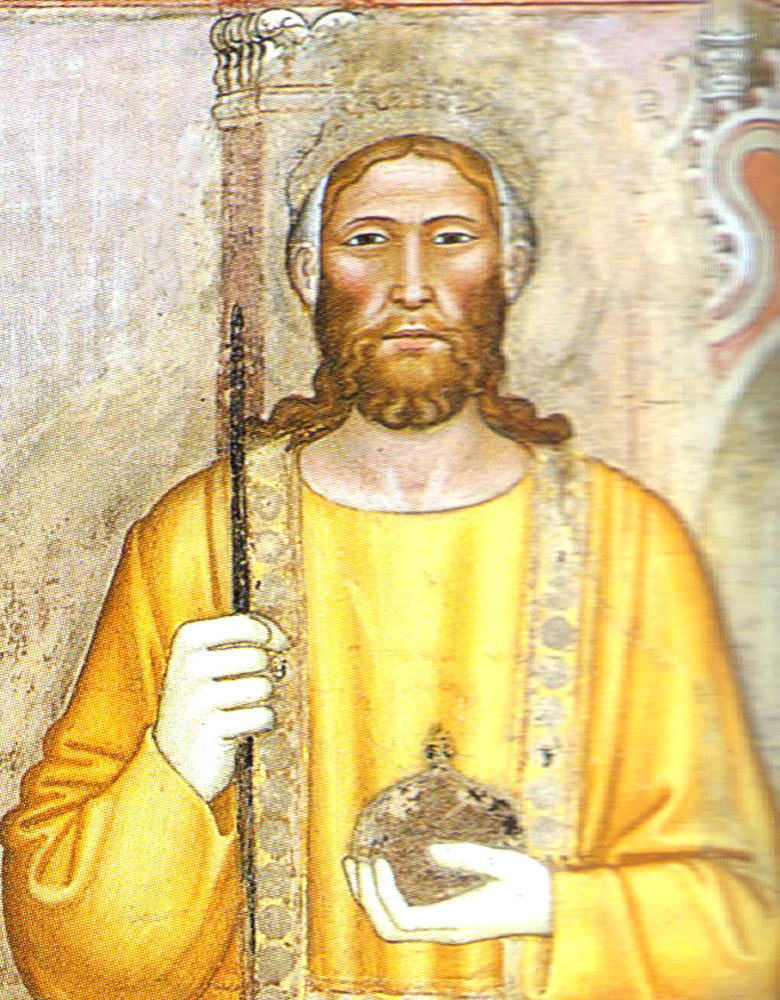 Pierre 1er de Lusignan par Andrea di Bonaiuto